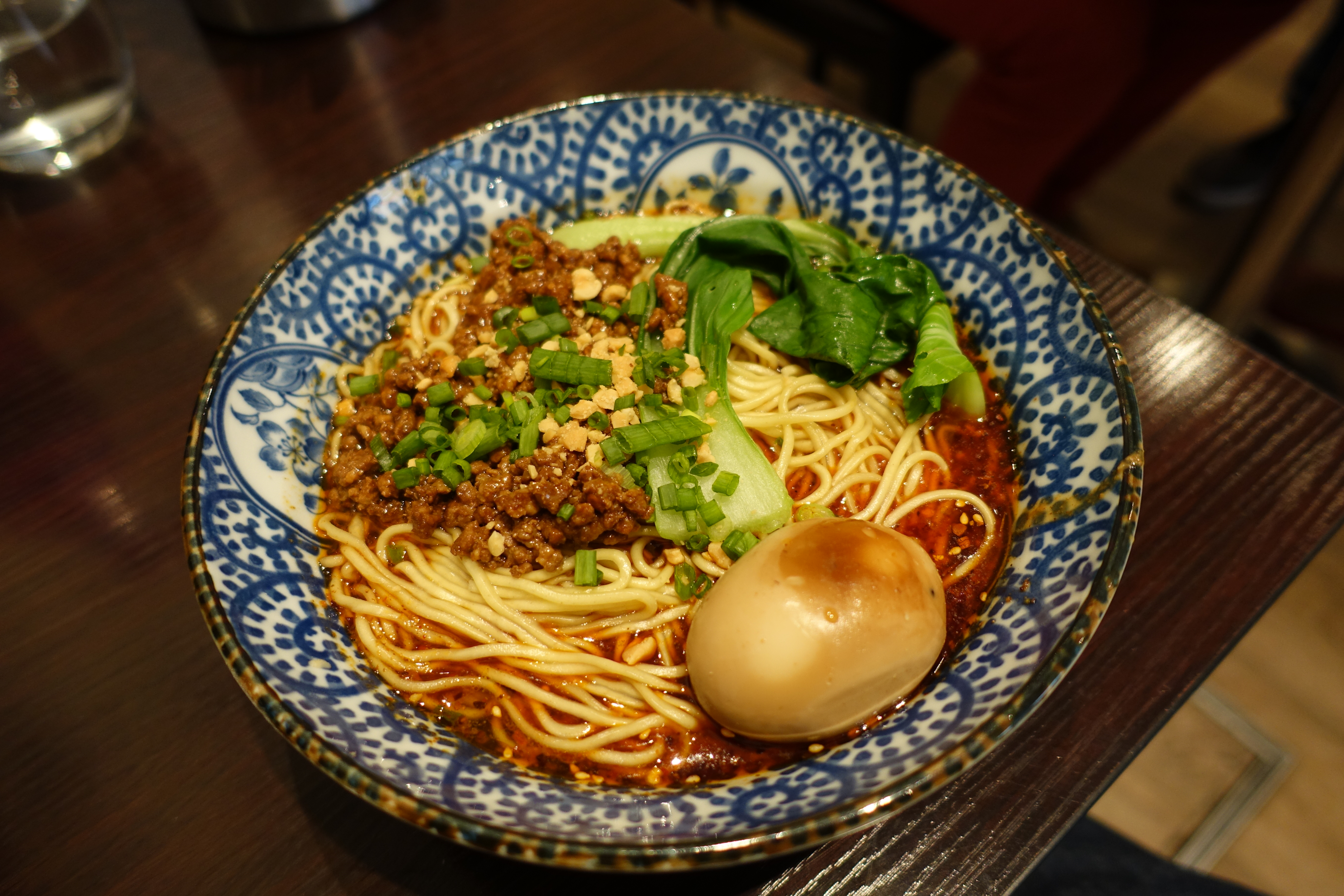 ChongQing Noodles @ Sucrépicé @ Paris